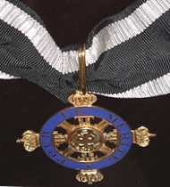 Preussischer Orden "Pour le Merit" für Kuntst und Wissenschaft.